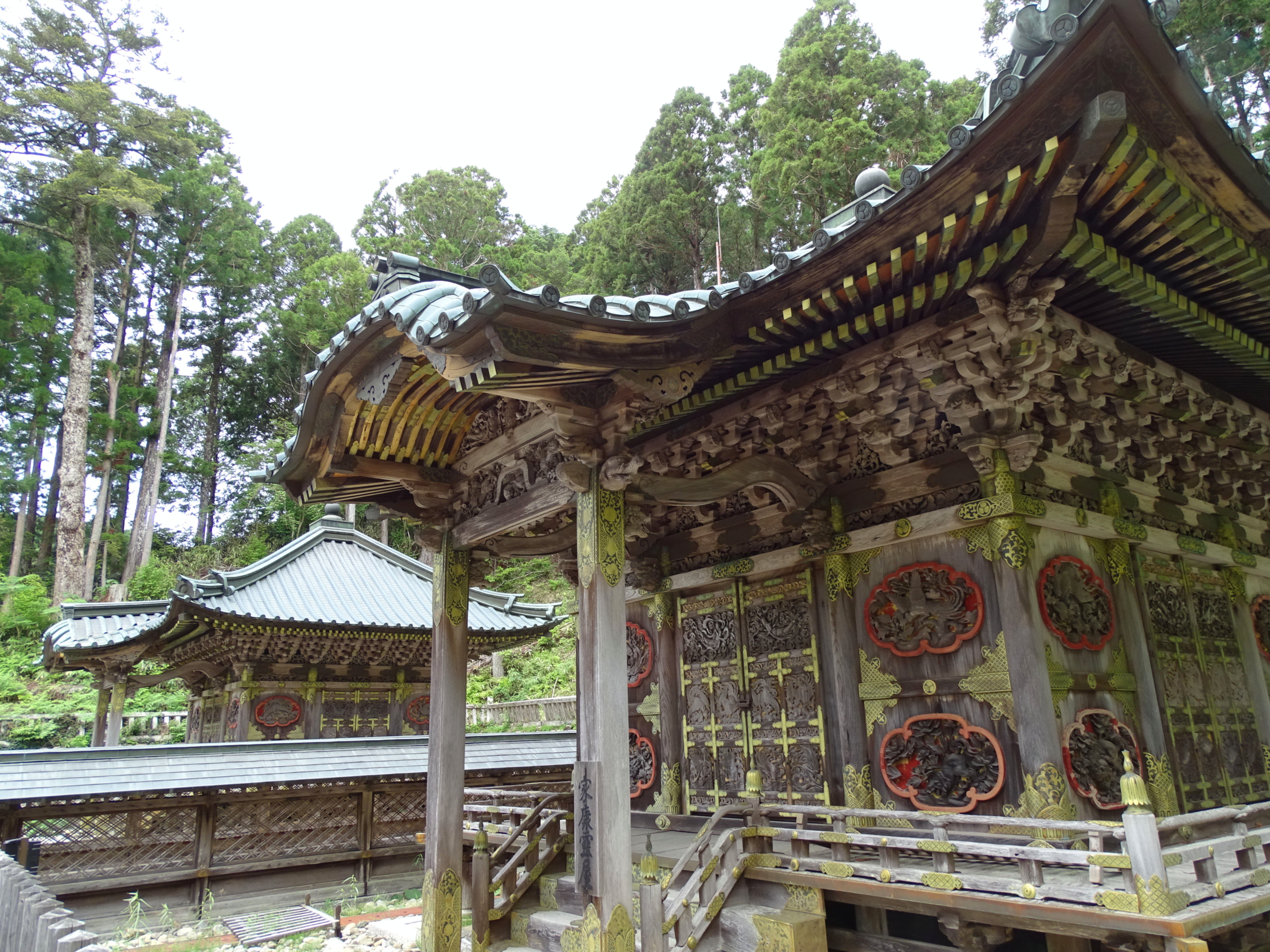 Tokugawa Mausoleum - Koyasan - Japan - 06